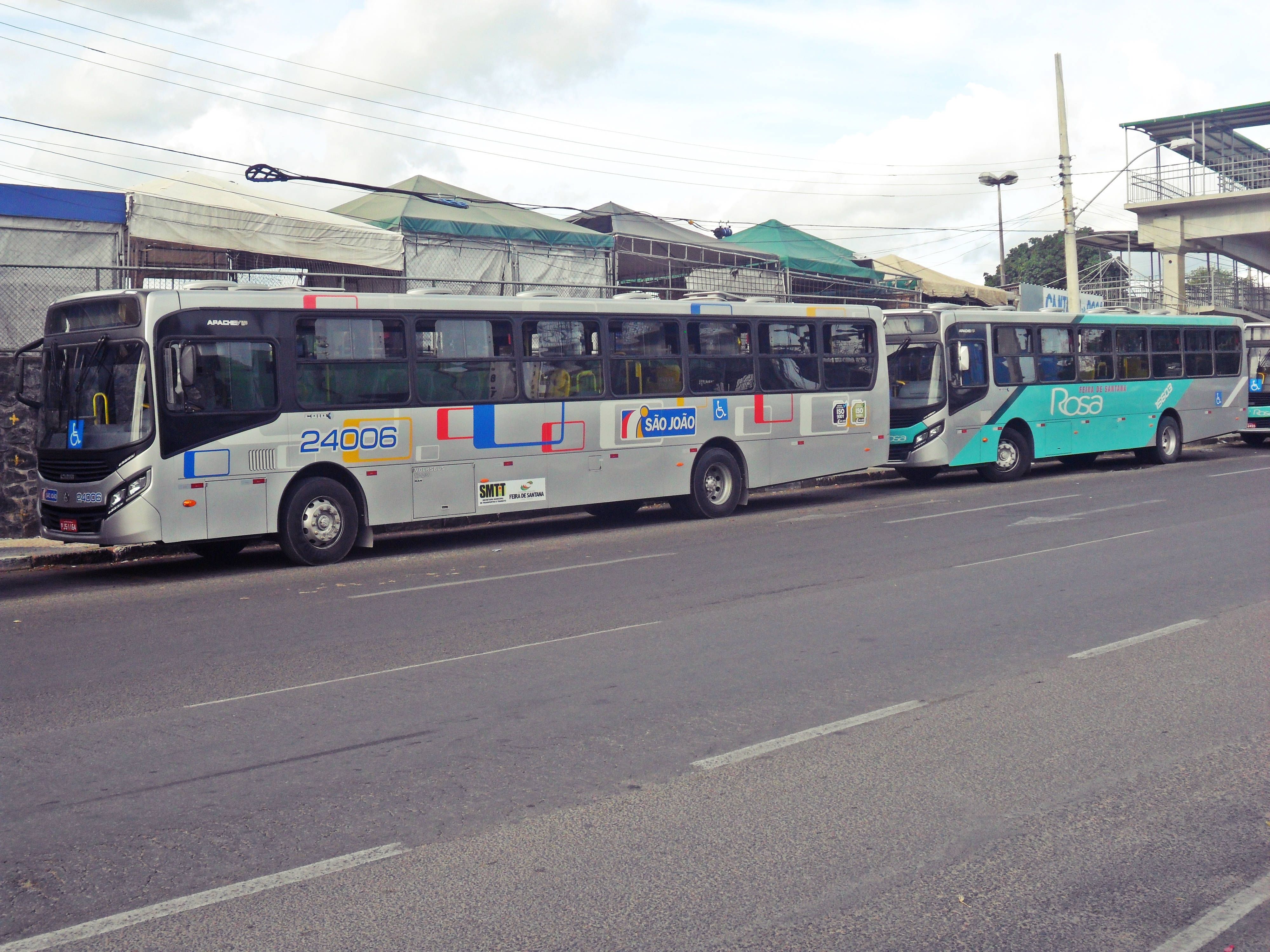 onibus urbano fsa